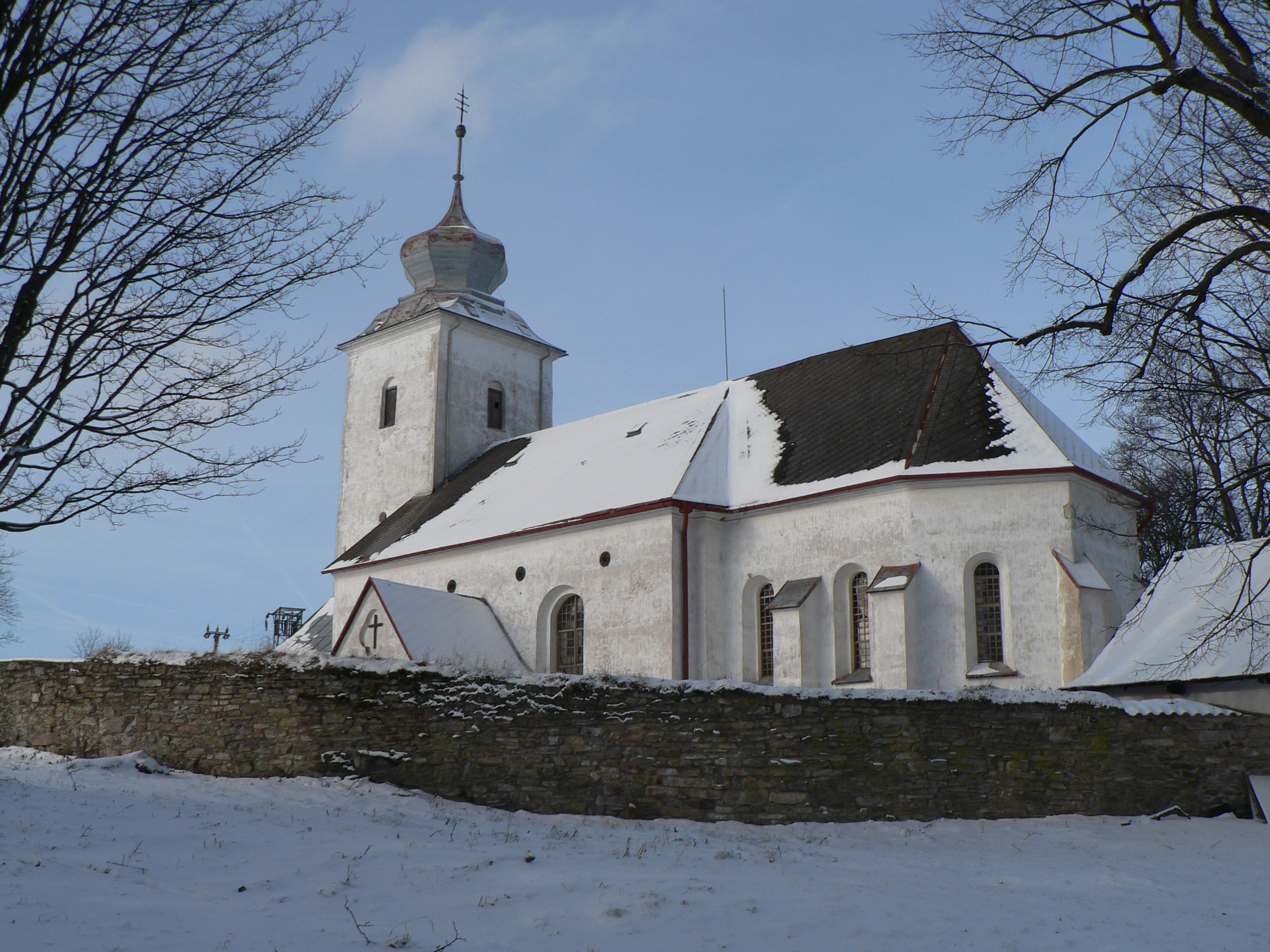 Kostel svaté Maří Magdalény (Podlesí)